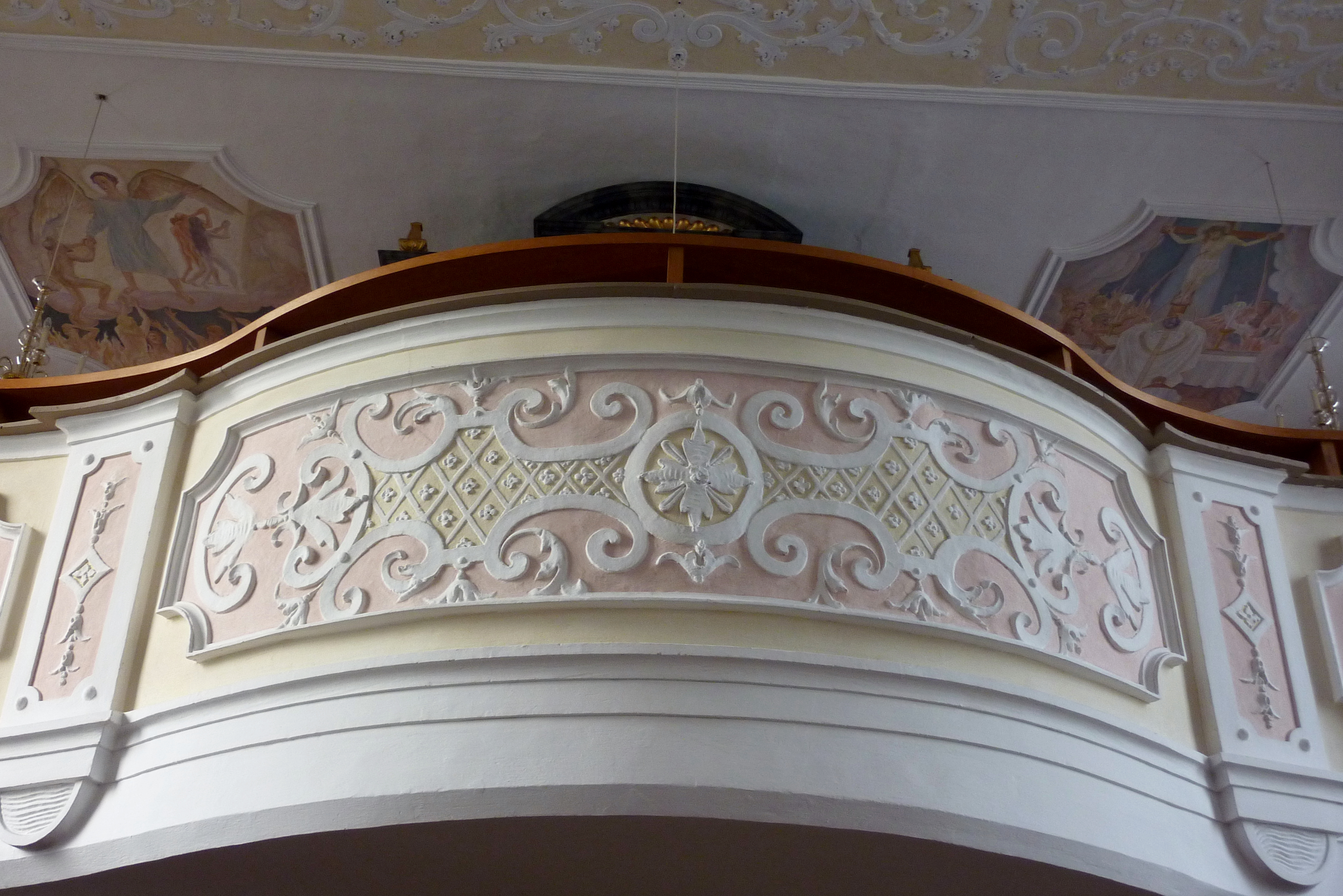 Katholische Pfarrkirche St. Martin in Holzheim bei Dillingen an der Donau, Detail der Empore